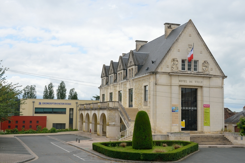 Mairie de Buzançais (Indre)